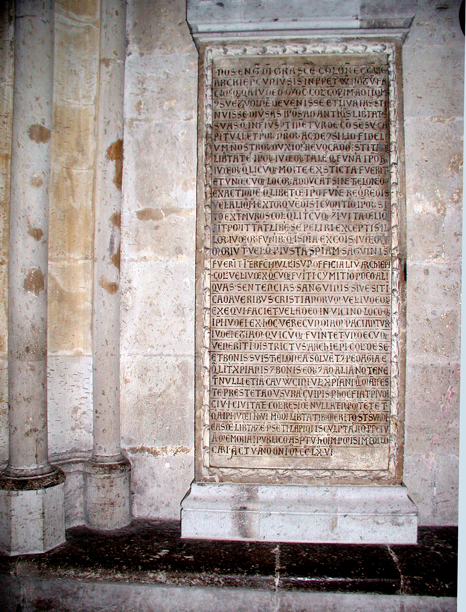 Köln 1266, Erzbischof Engelbert II. gibt den Juden das Privileg zur ungehinderten Bestattung ihrer Toten vor der südlichen Stadtmauer (Judenbüchel)